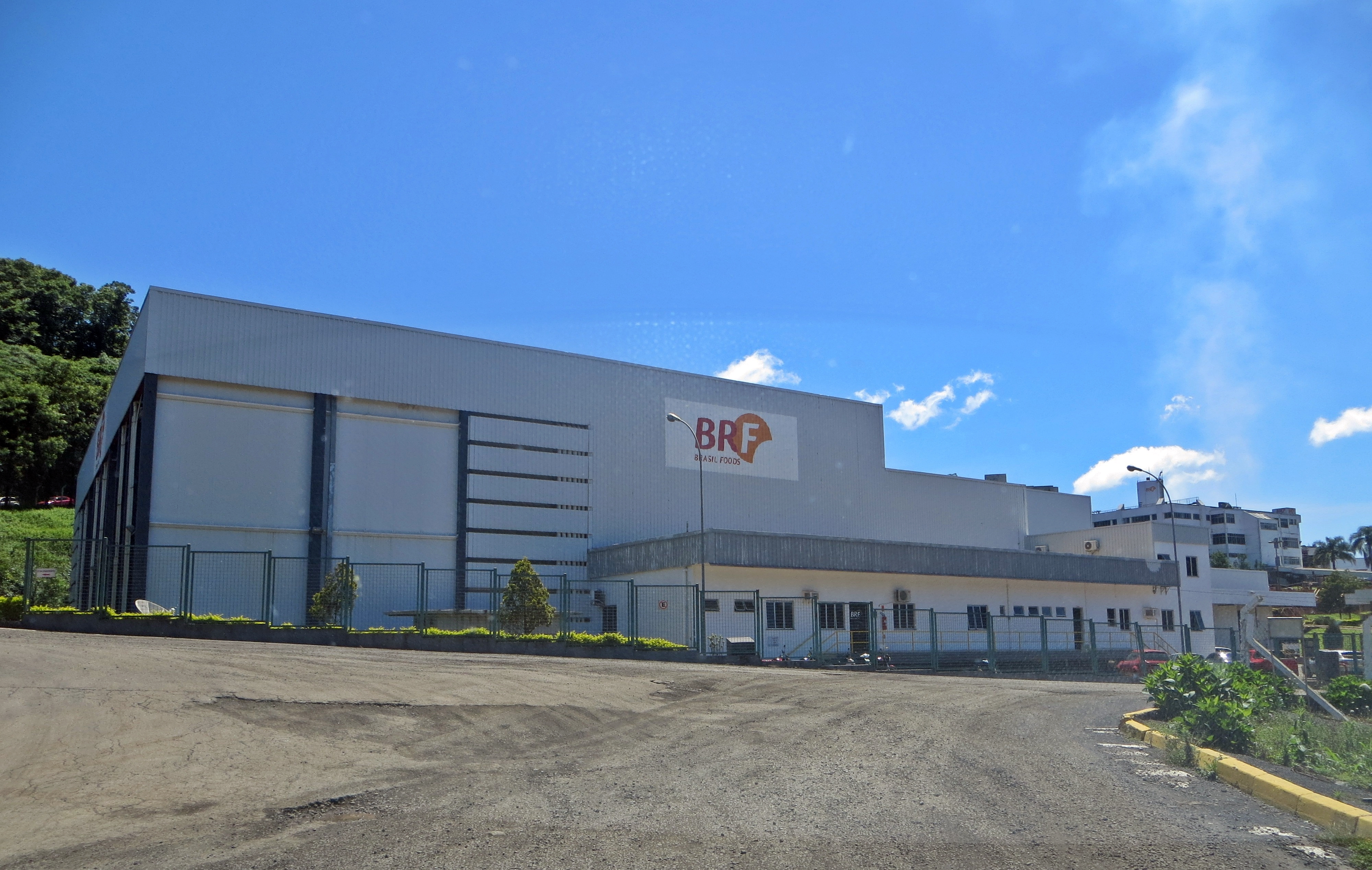 Perdigão Agroindustrial - Fábrica de Rações em Videira, Santa Catarina, Brazil.